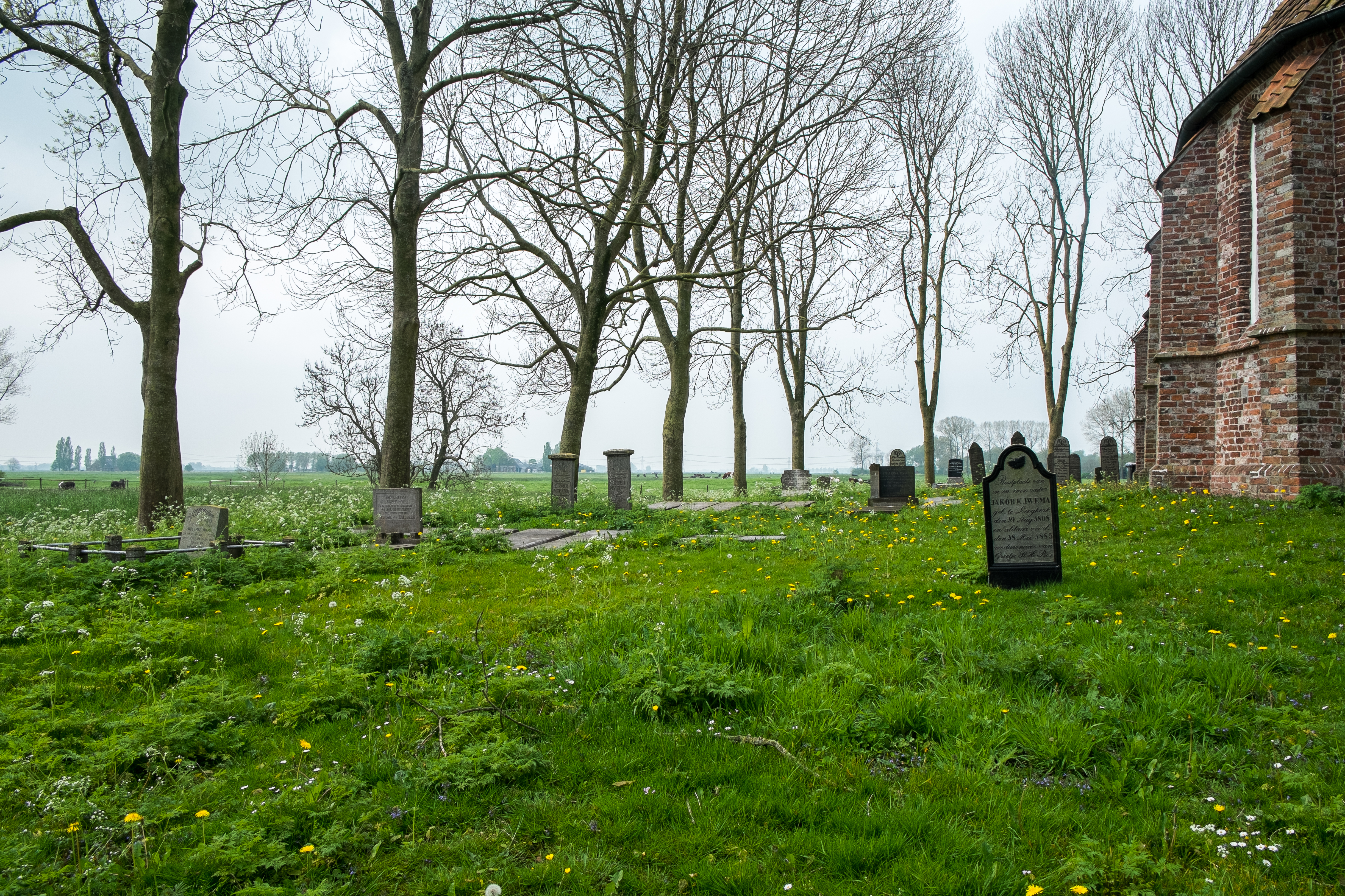 kerkhof van Leegkerk